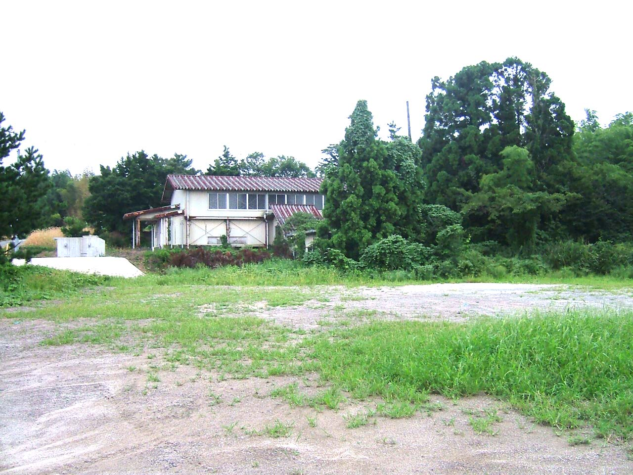 大山町立名和小学校神田分校跡